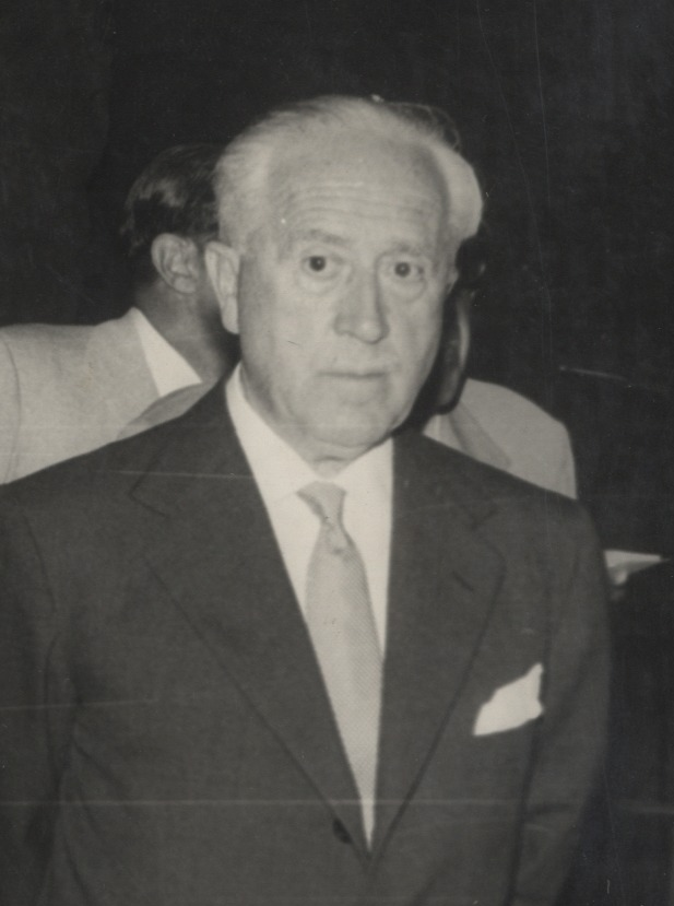 Título original: Visita de personalidades al Castillo dentro de los actos conmemorativos del Tricentenario de la Paz de los Pirineos Localización: Hondarribia